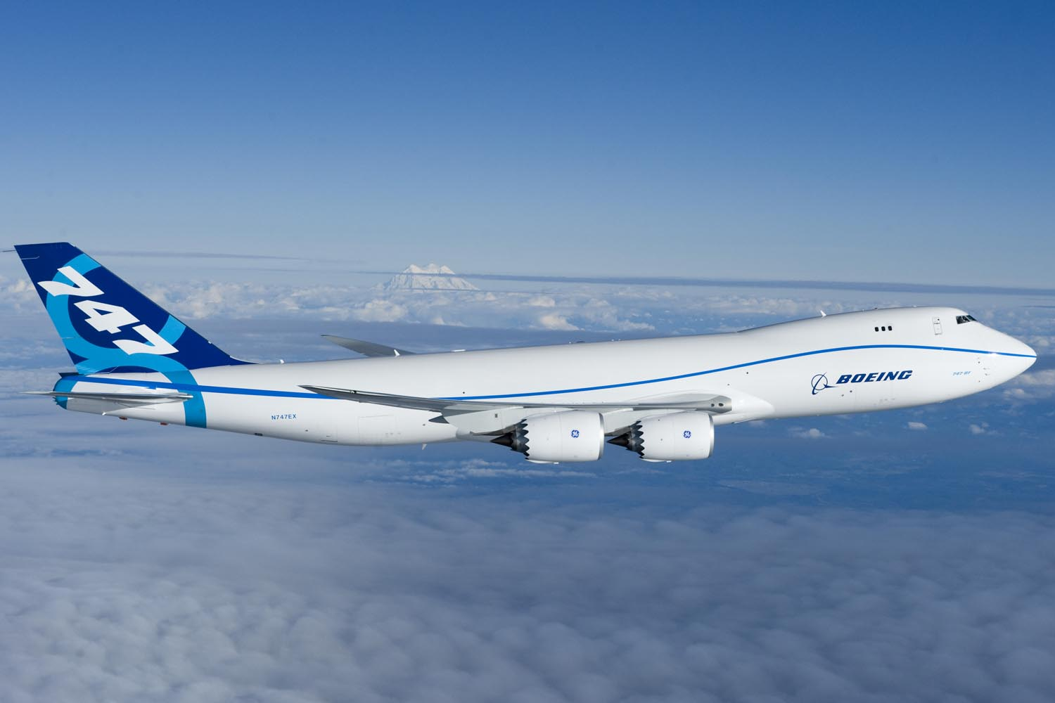 Boeing 747-8 first flight Everett, WA.